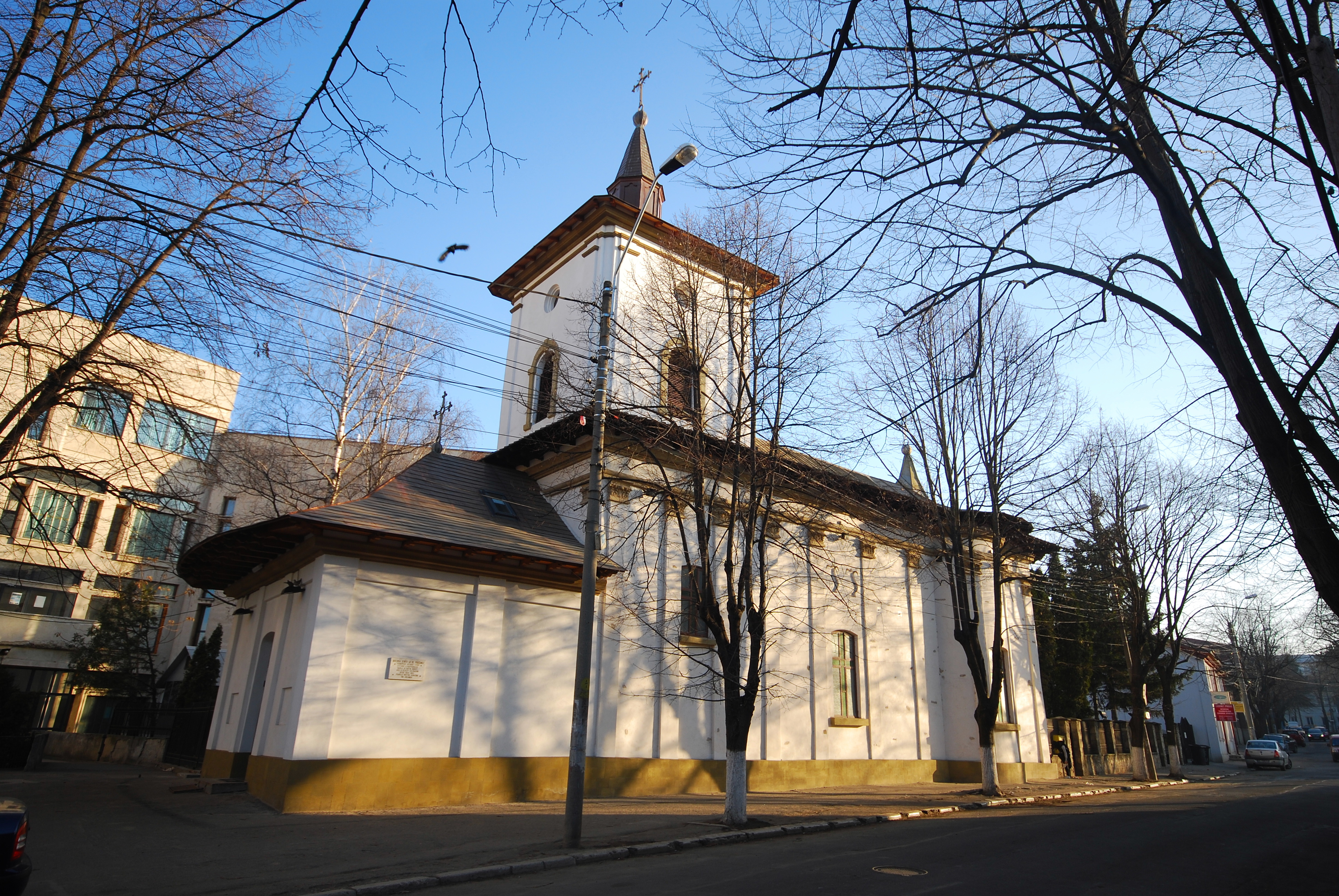 Biserica "Sf. Patruzeci de Mucenici"